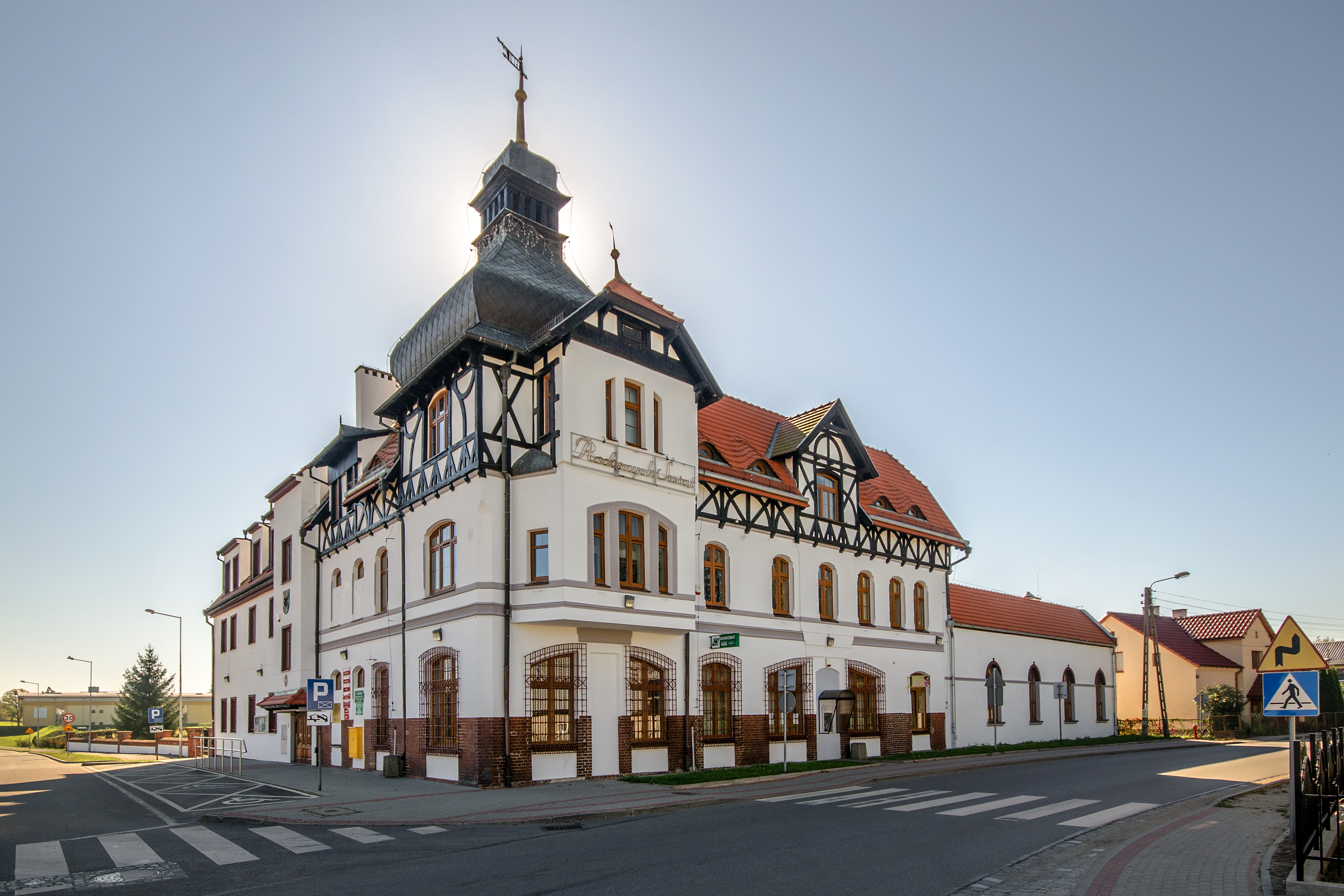 Miękinia, dom nr 81, ob. Urząd Gminy w Miękini, 1906